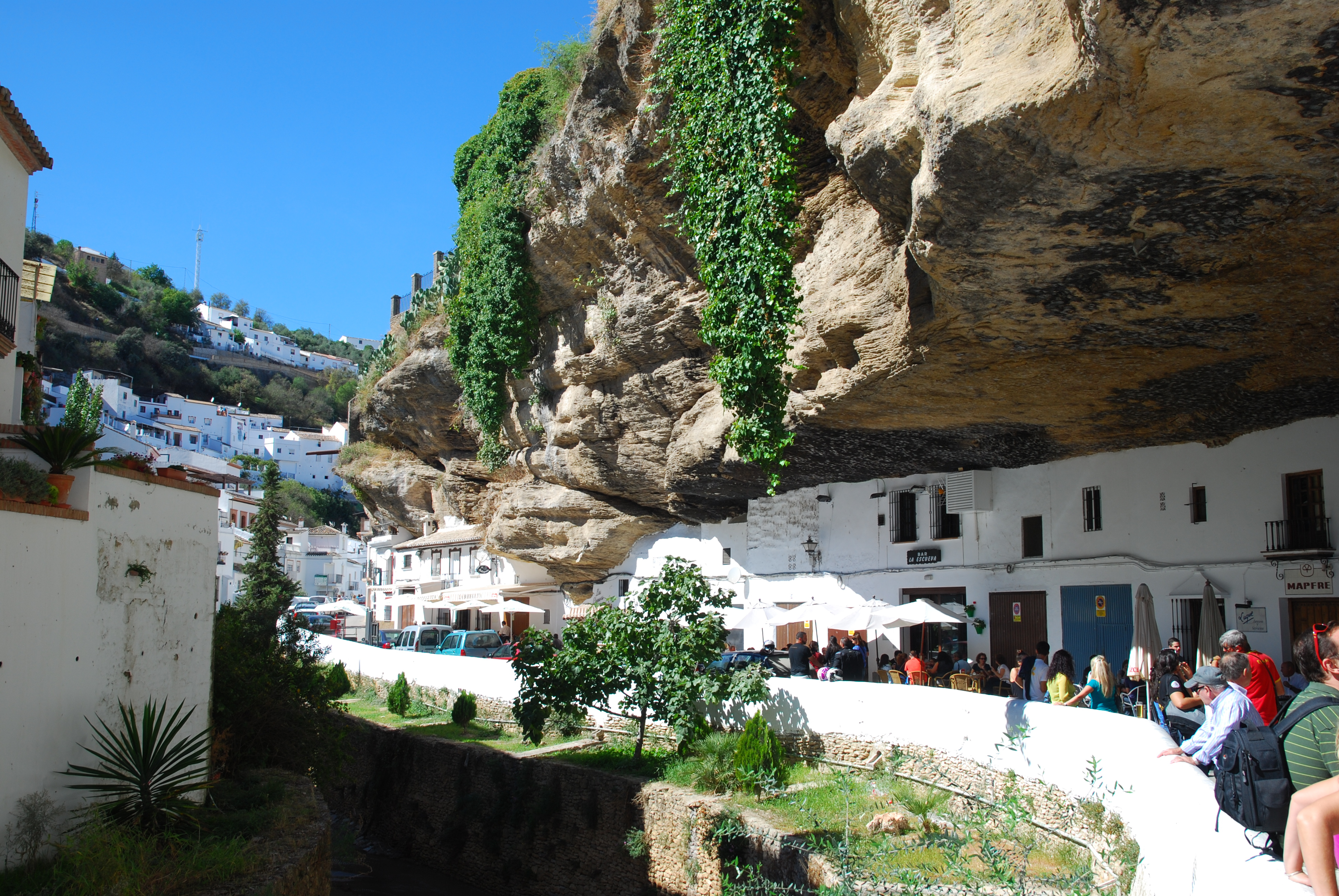 Vista de la localidad de Setenil de las Bodegas, en la provincia de Cádiz (España)